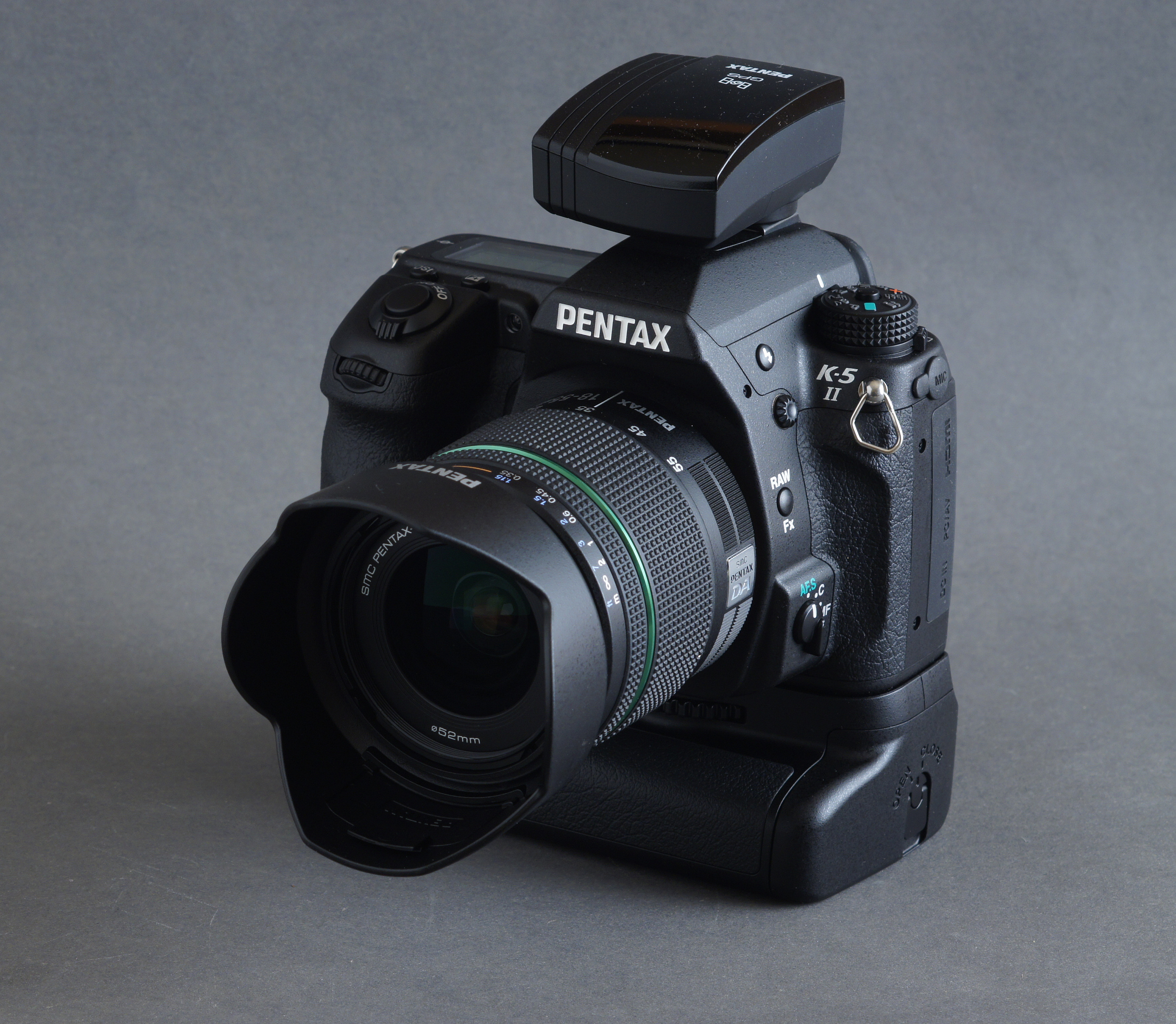 Pentax K-5 II mit DA 3.5-5.6/18-55 WR, Hochformat-Batteriegriff D BG-4, GPS-Modul Pentax O-GPS1. Aufnahme mit Minolta Rokkor MC 3.5/100mm Makro